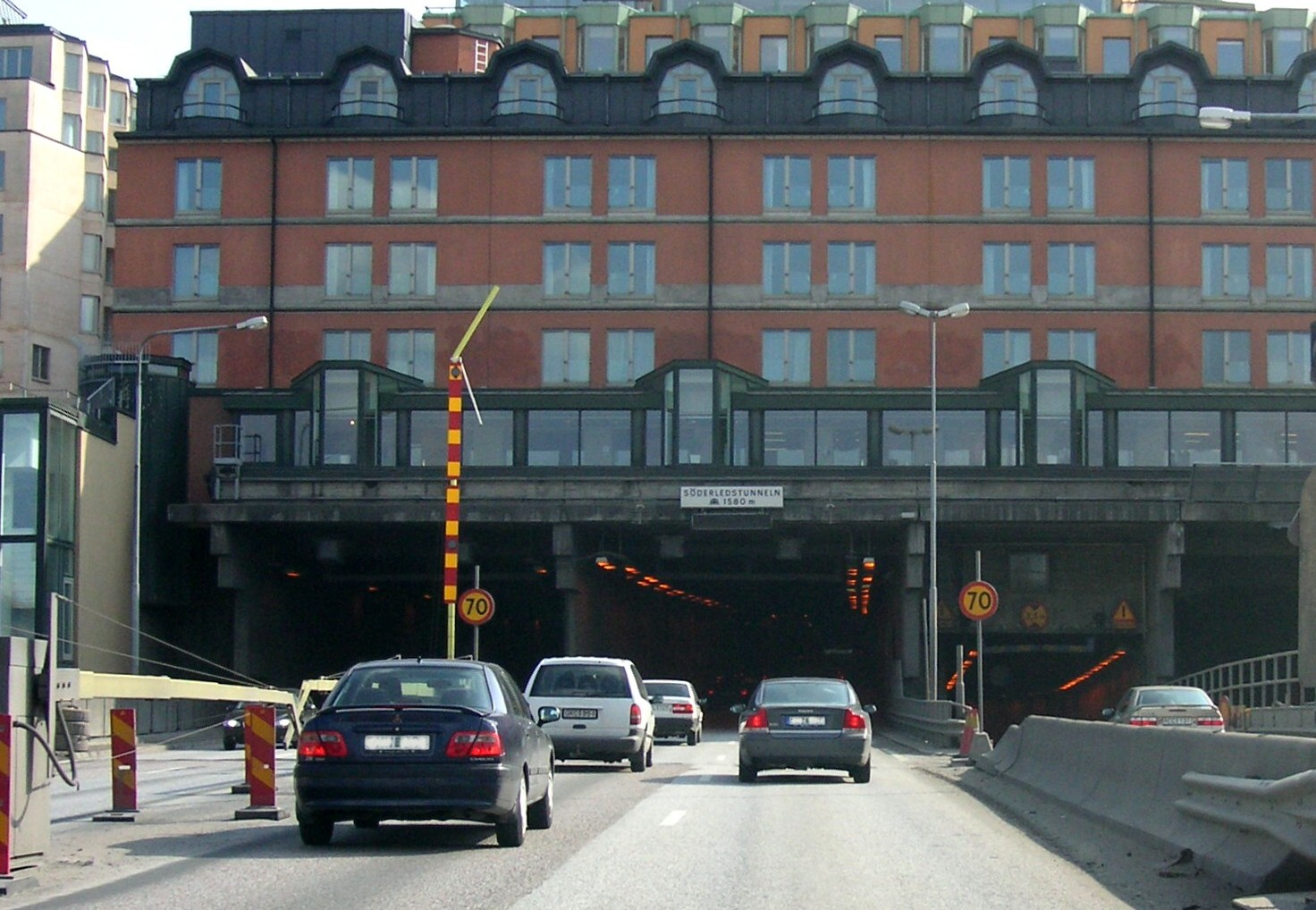 Infarten till Söderledstunneln från Centralbron i Stockholm